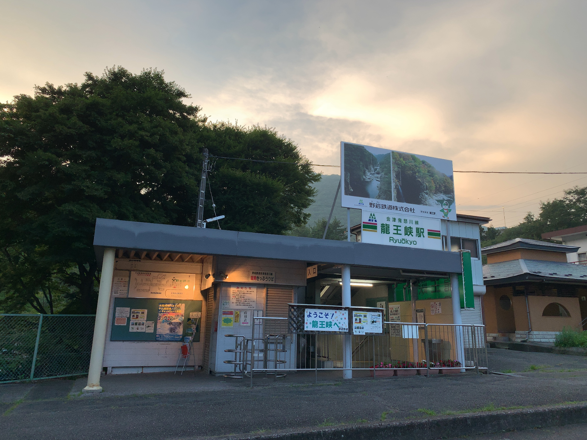 野岩鉄道 龍王峡駅 駅舎